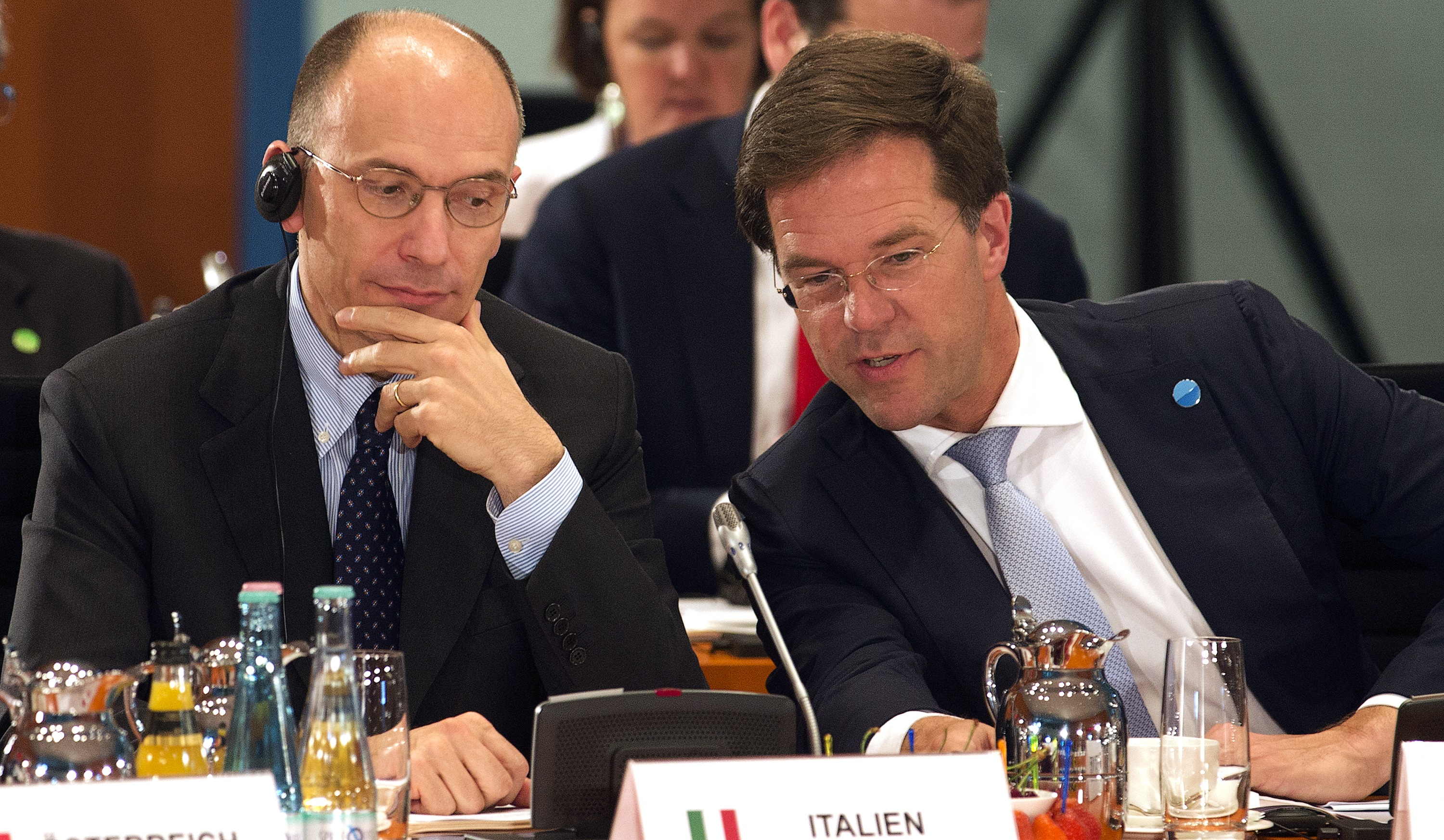 BERLIJN - Premier Enrico Letta (L, Italie) en premier Mark Rutte tijdens een topbijeenkomst over jeugdwerkloosheid. Rutte is, samen met andere Europese regeringsleiders, bij de conferentie op uitnodiging van de bondskanselier Angela Merkel. ANP JERRY LAMPEN